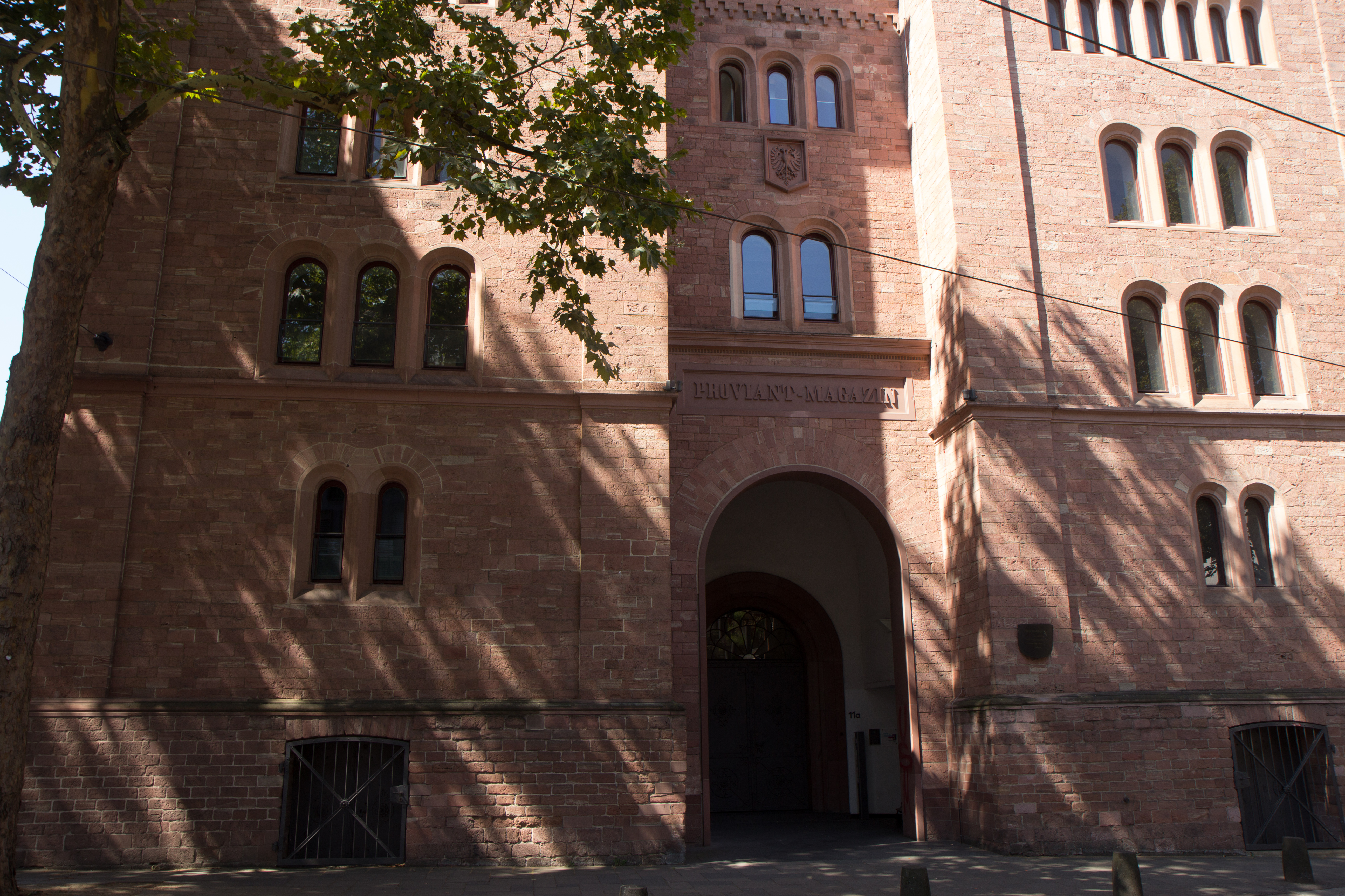 Proviant-Magazin, Schillerstraße 11a, in Mainz. Sitz u.a. des FDP Landesverbandes Rheinland-Pfalz.